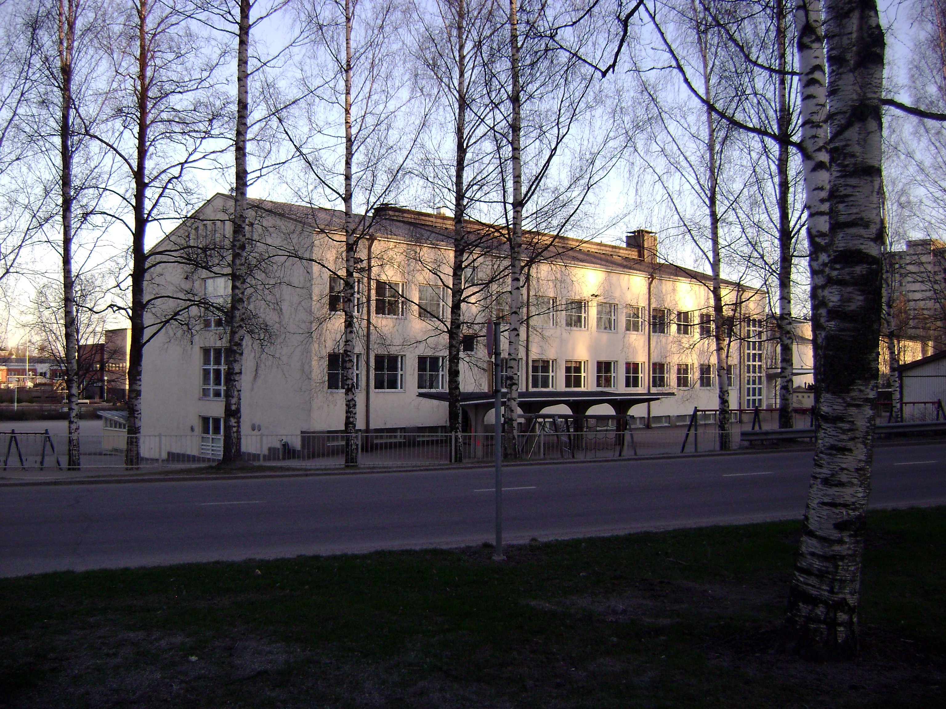 Keravan keskuskoulu.